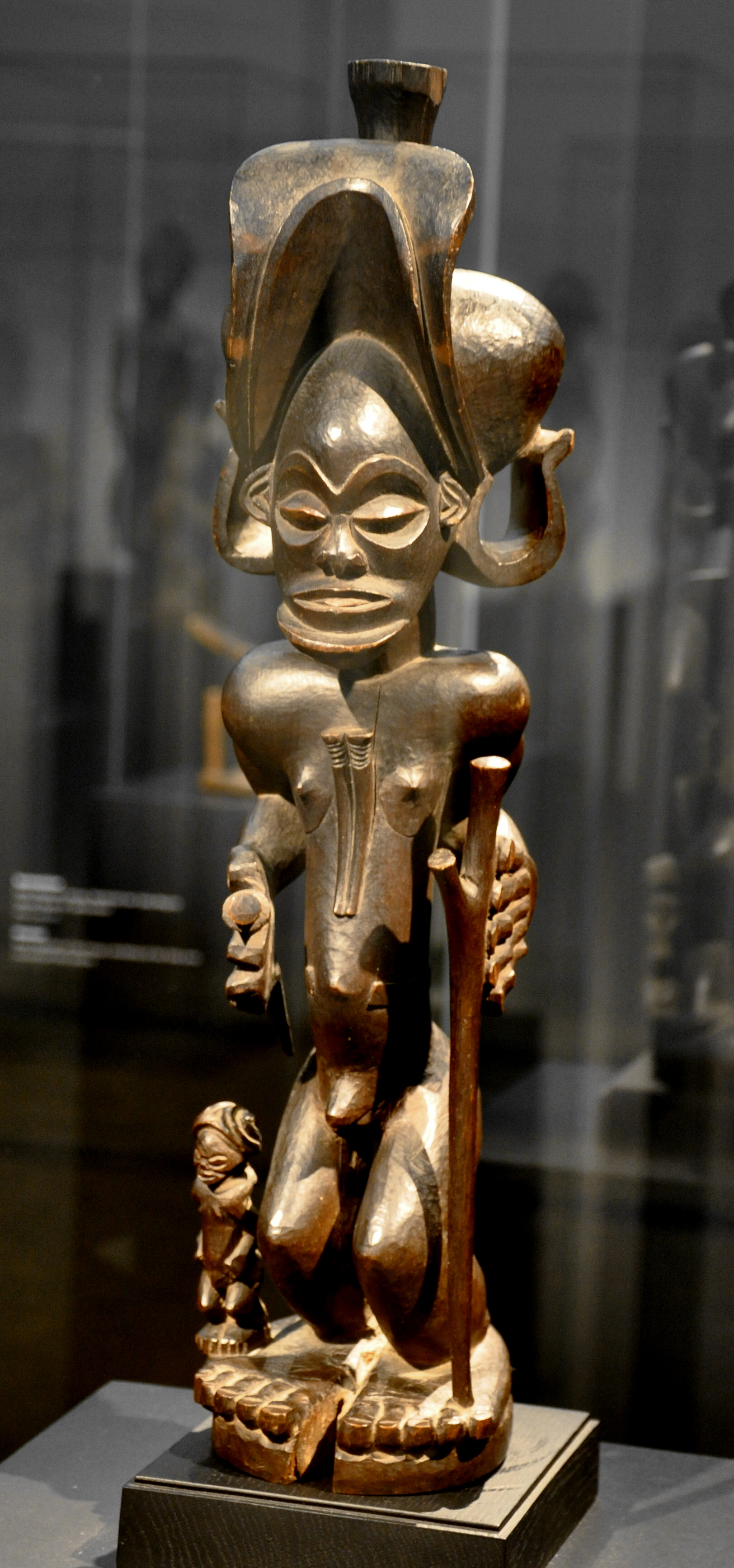 Figur des Fürsten Chibinda Ilunga; Werkstatt der Chokwe-Region; Angola, um 1850; Holz Museum Rietberg, Zürich; Geschenk durch Vermittlung der Novartis AG, Inv. Nr. 2007.1